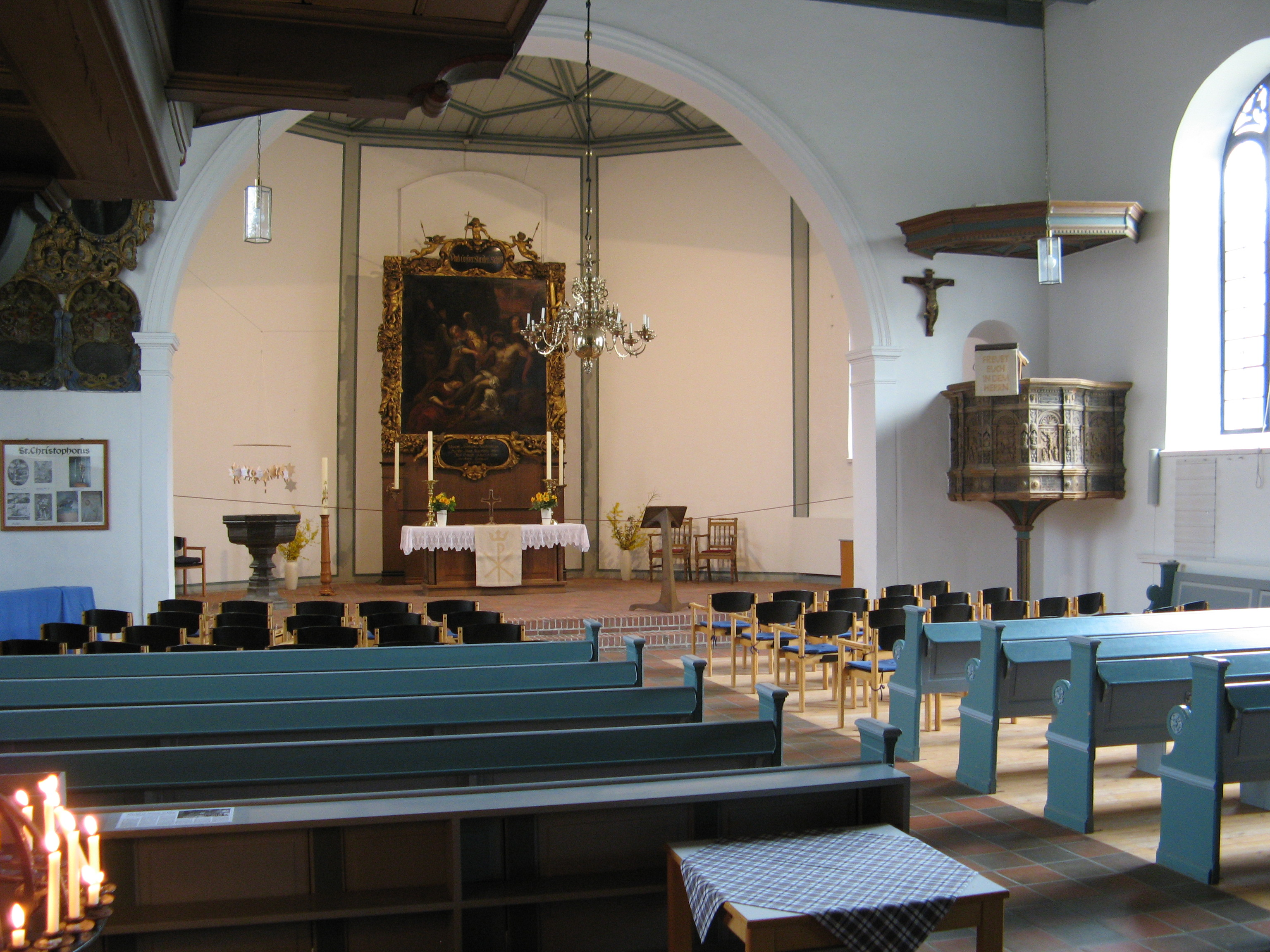 lutheran saint christopherus church in Friedrichstadt Author: Dirk Ingo Franke